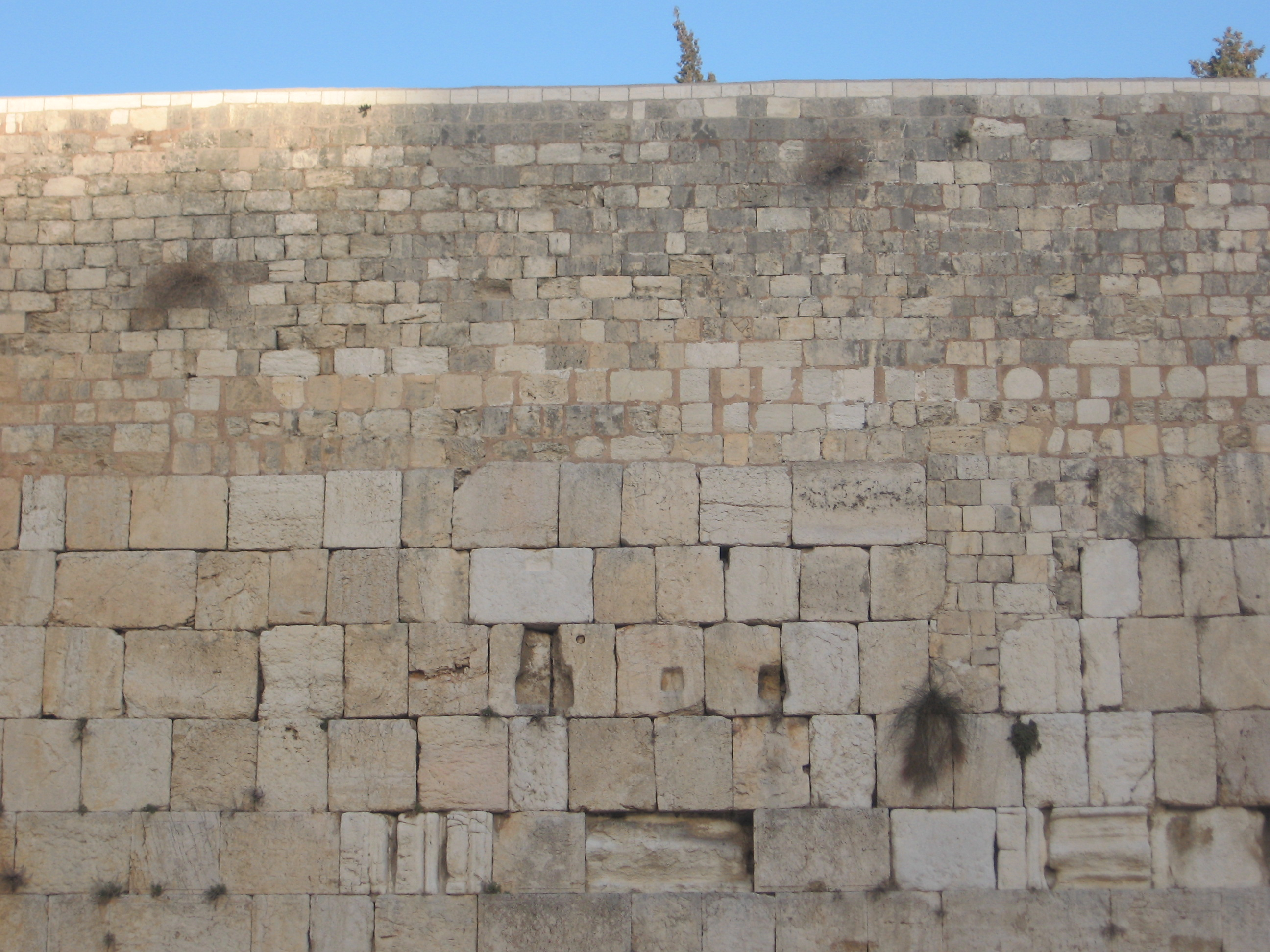 ירושלים